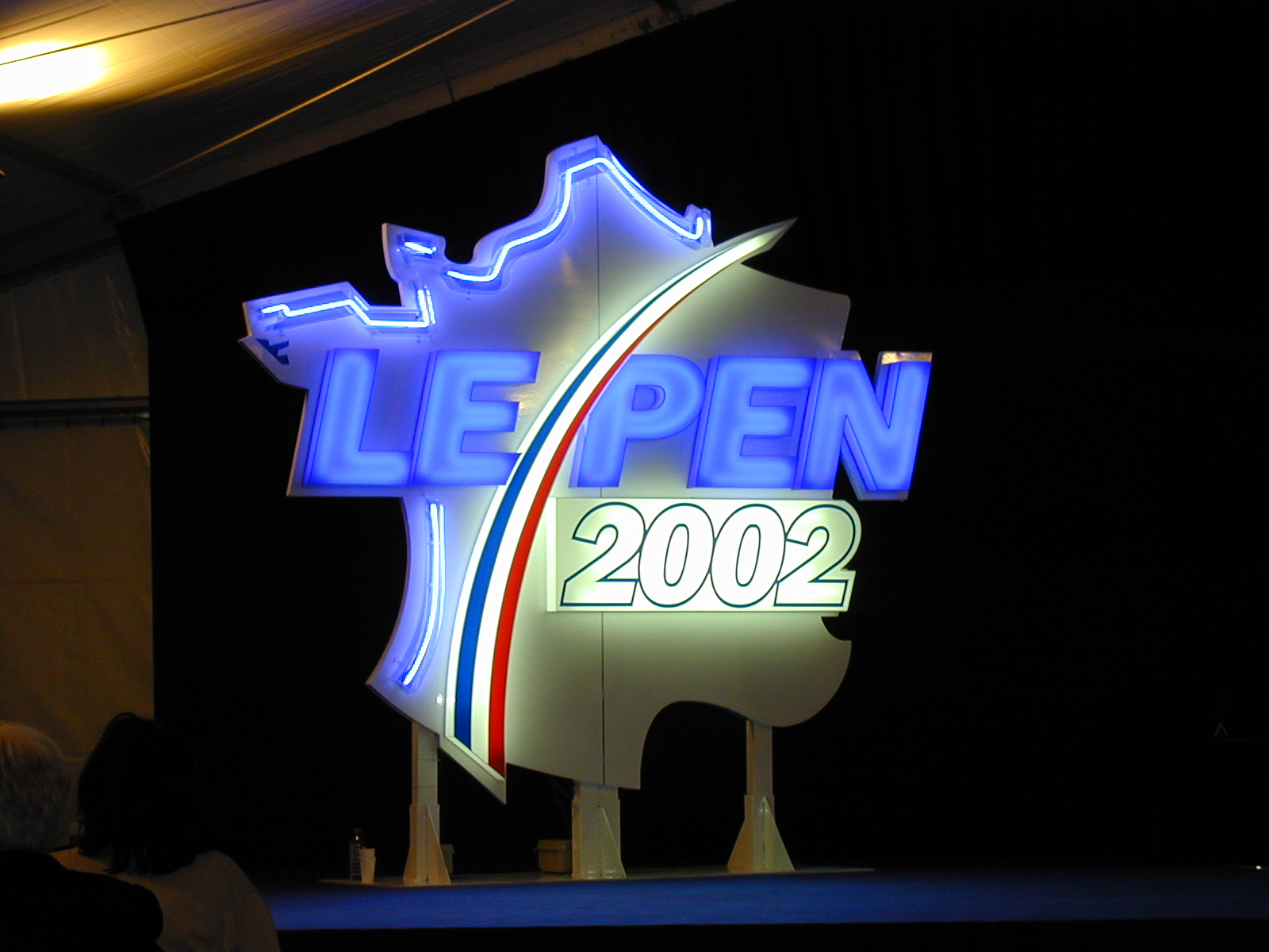 Présidentielles françaises de 2002.